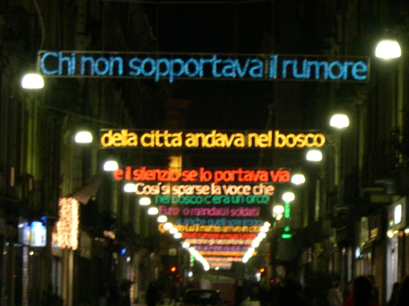 Luci d'artista a Torino - Luigi MAINOLFI Luì_e_l'arte_di_andare_nel_bosco Foto di Archenzo